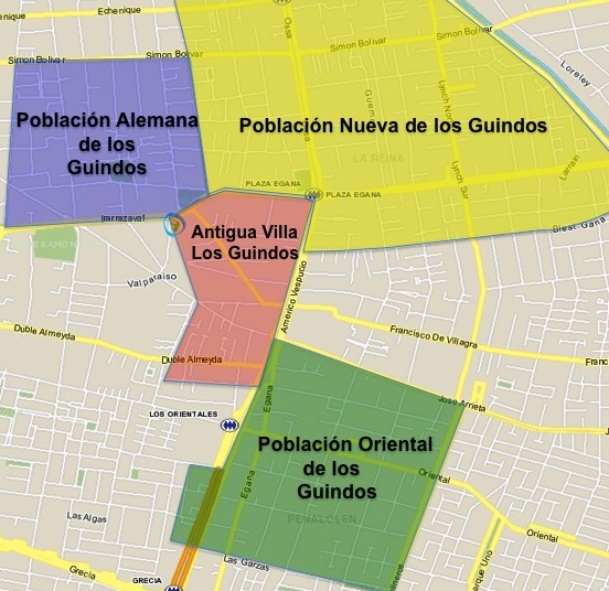 Plano con ubicación de antigua villa los Guindos y poblaciones adyacentes Nueva de los Guindos, Oriental y Alemana.